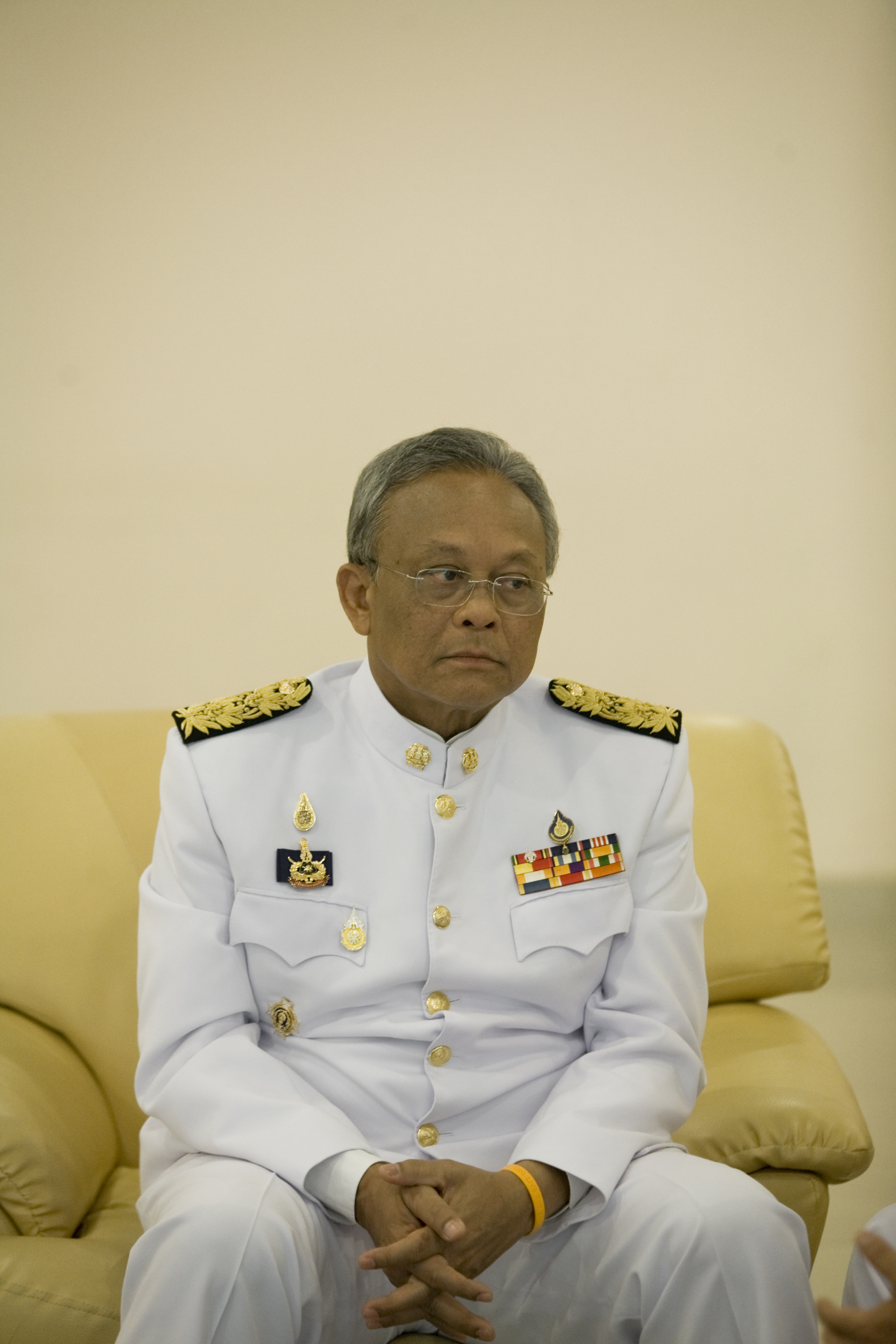 นรม.และครม. บันทึกเทป ถวายพระพร สมเด็จพระนางเจ้าพระบรมราชินีนาถ ณ NBT 6สิงหาคม2552 (The Official Site of The Prime Minister of Thailand Photo by พีรพัฒน์ วิมลรังครัตน์)